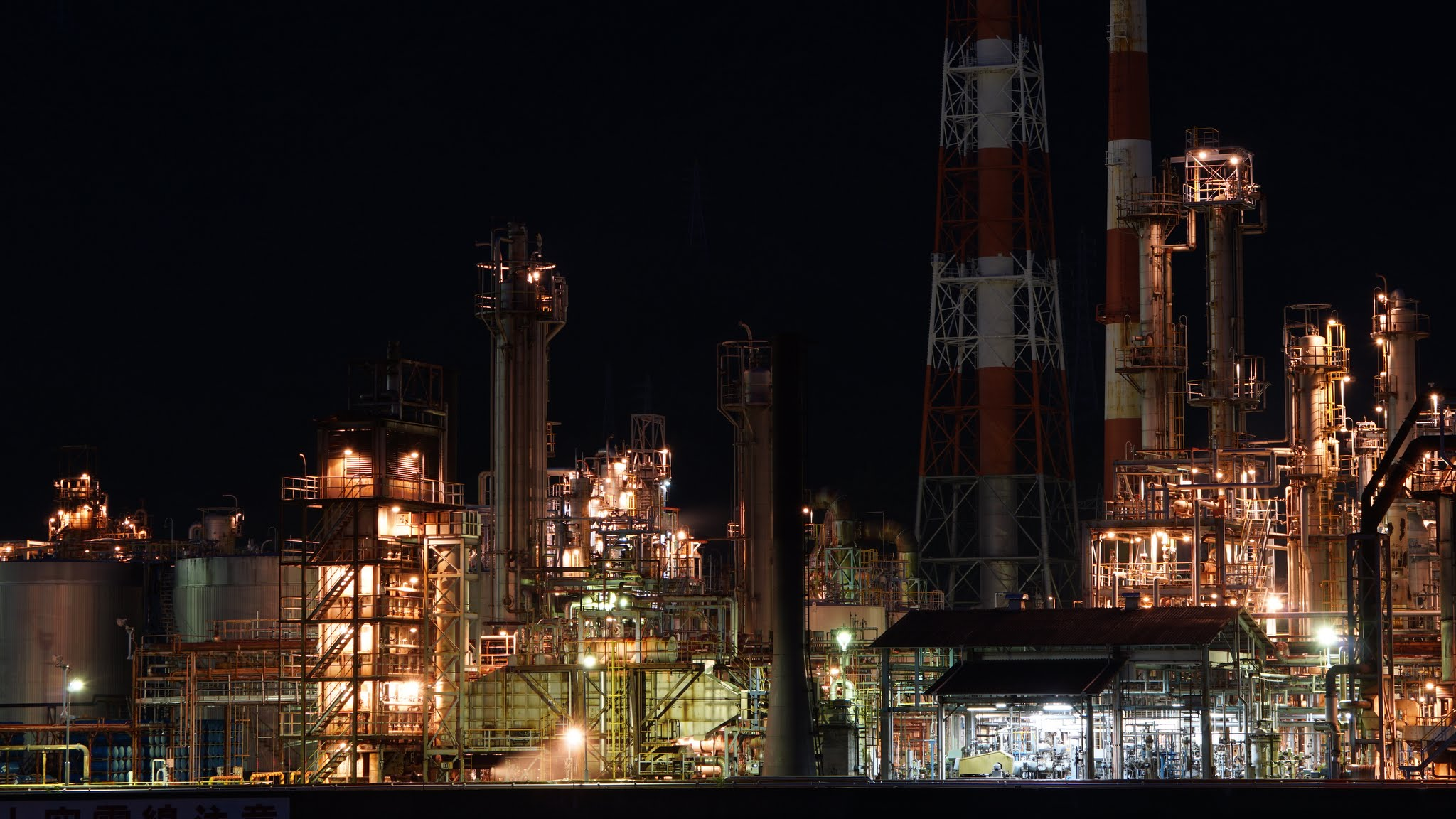 和歌山石油精製：海南港から見たプラントの夜景